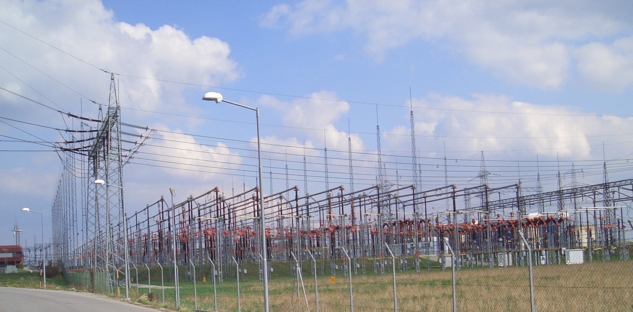 Umspannwerk Wien-Südost, 380kV-Sammelschienen (Freiluftschaltfeld), Westlicher Anlagenteil; Links-vorne das Portal der 380kV-Anbindung an Wienstrom (Südeinspeisung Wien zum Umspannwerk Wien-Süd)